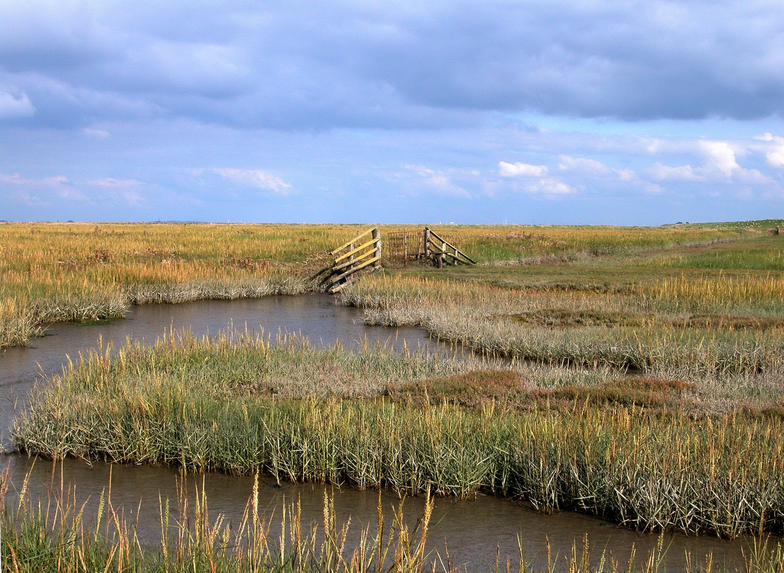 Salzwiesen im Norden von Eiderstedt Standort:54°24′5.57″N 8°45′3.43″E / 54.4015472°N 8.7509528°E